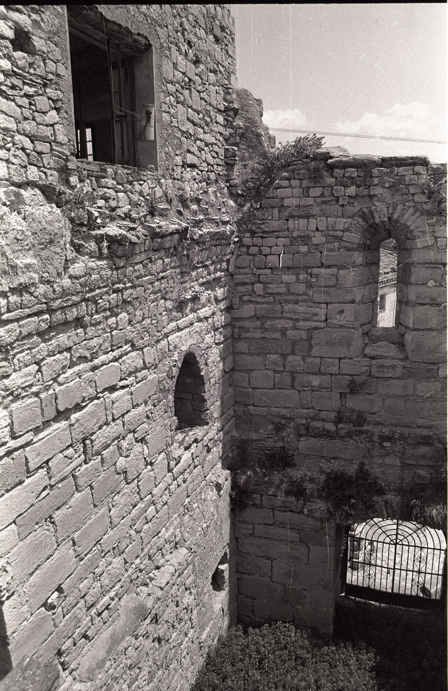 Castell de Barberà, 1993. Ensorrament de la teulada, 2.